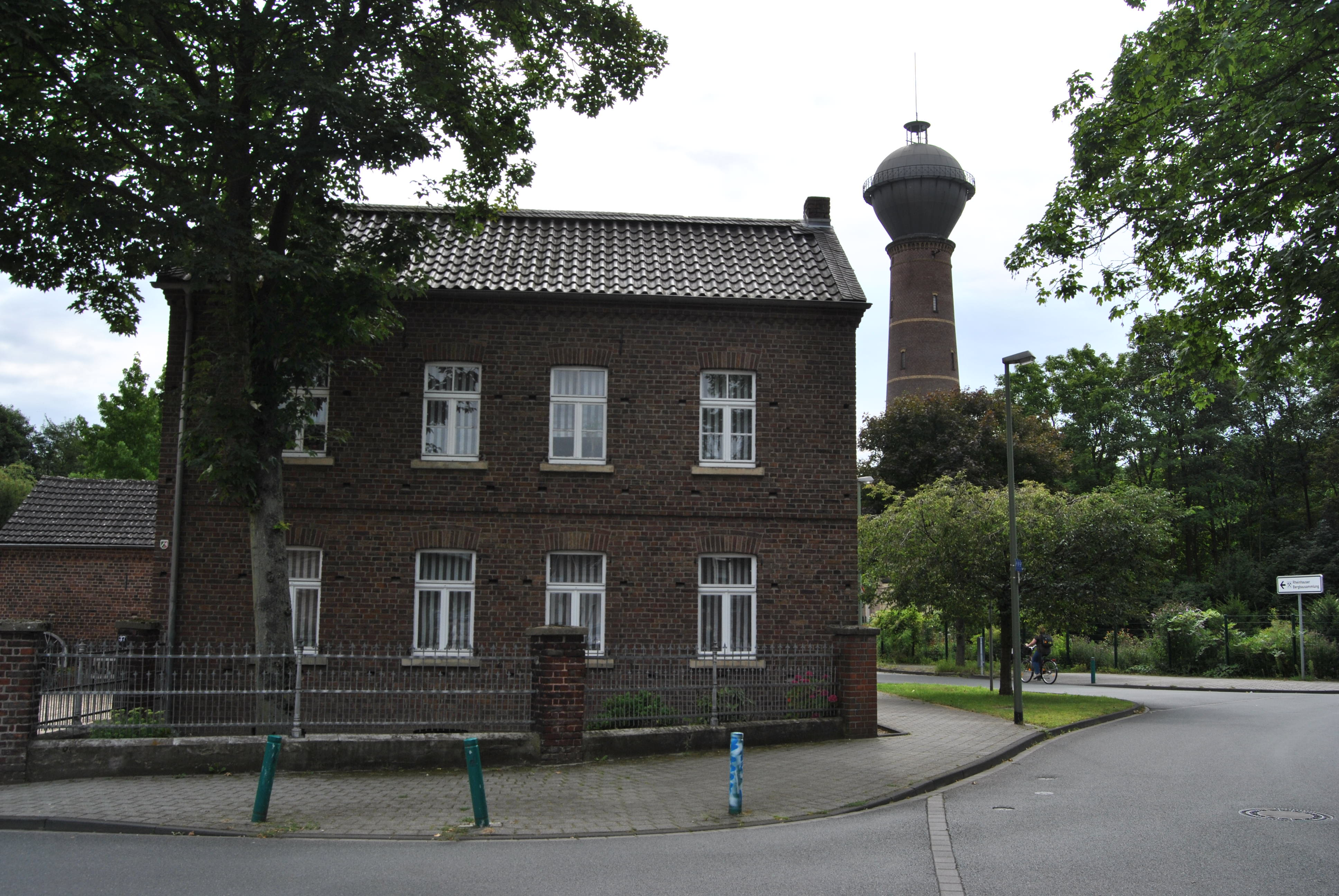 This photograph was taken with a Nikon D3000 This image shows a heritage building in Germany, located in the North Rhine-Westphalian city Duisburg. "DenkmÃ¤ler unter sich": Wohnhaus des ehemaligen Grashofes mit dem Wasserturm Rheinhausen-Bergheim im Hintergrund - Denkmalliste Duisburg, Nr. 509 und 178 - Koordinaten: 51Â°24'22.07"N, 6Â°41'32.5"E, Blickrichtung 12